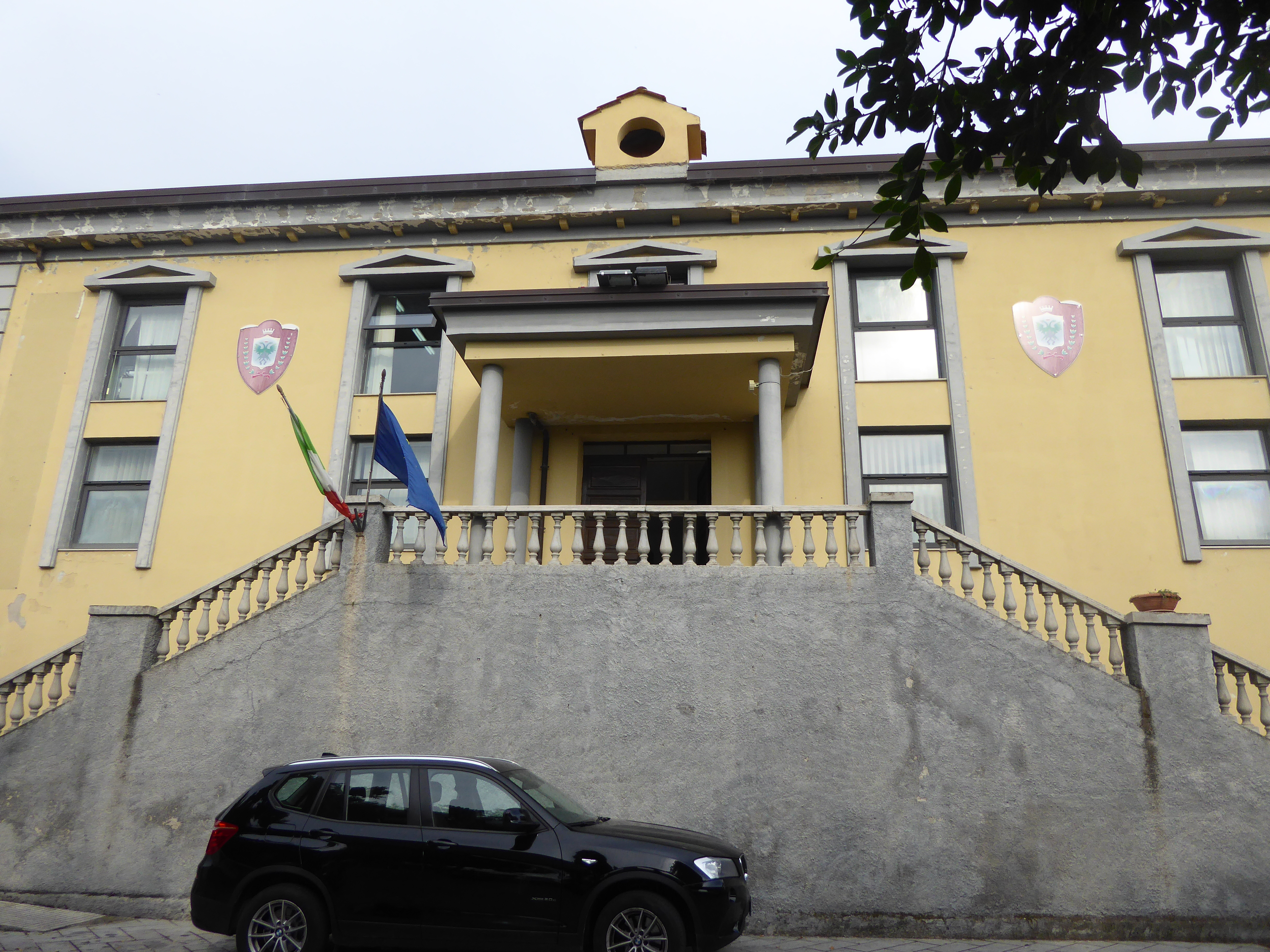 Municipio di Stignano (agosto 2018)